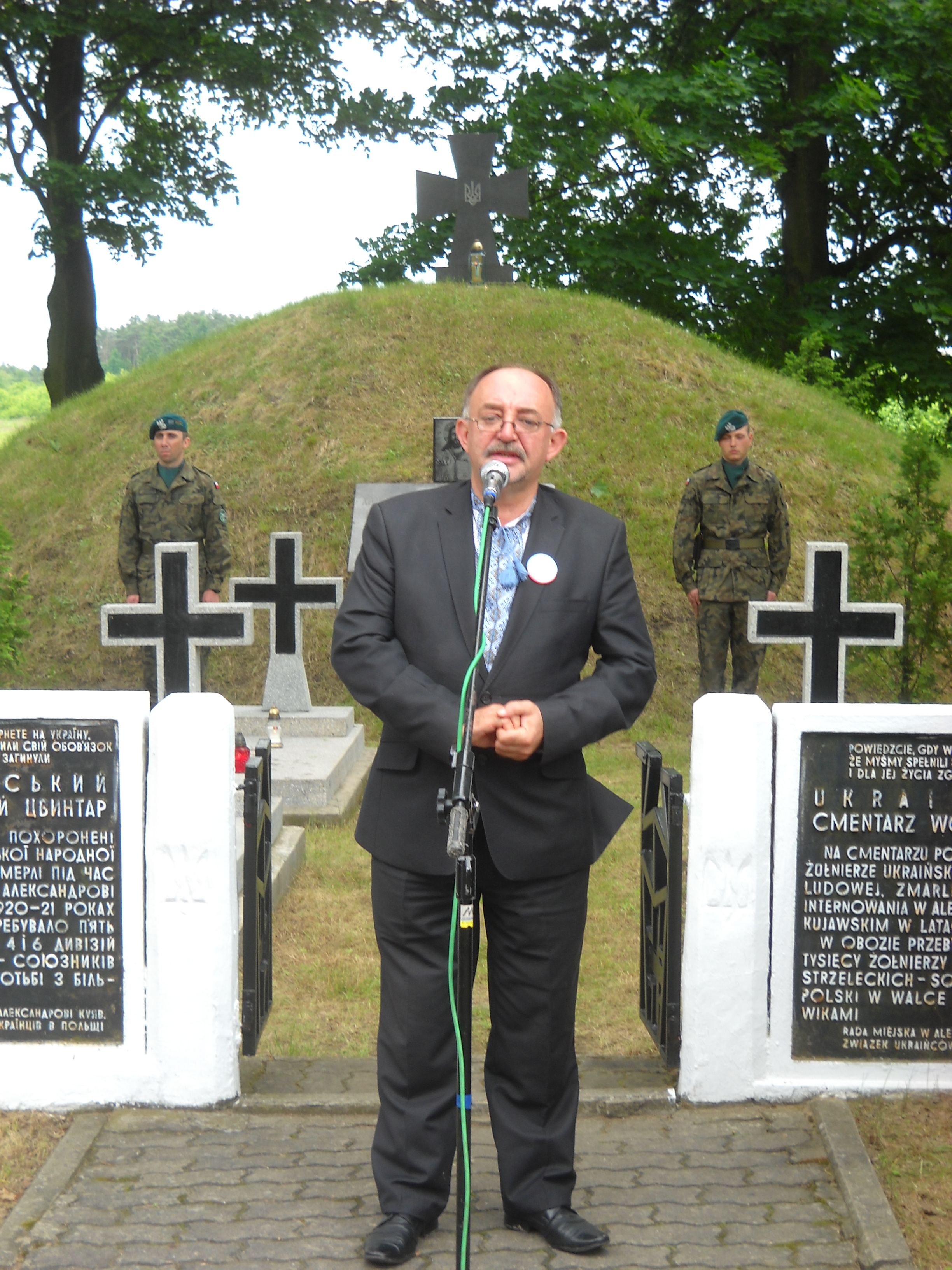 Poseł Miron Sycz na uroczystościach na Ukraińskim Cmentarzu Wojskowym w Aleksandrowie Kujawskim, 1 czerwca 2013